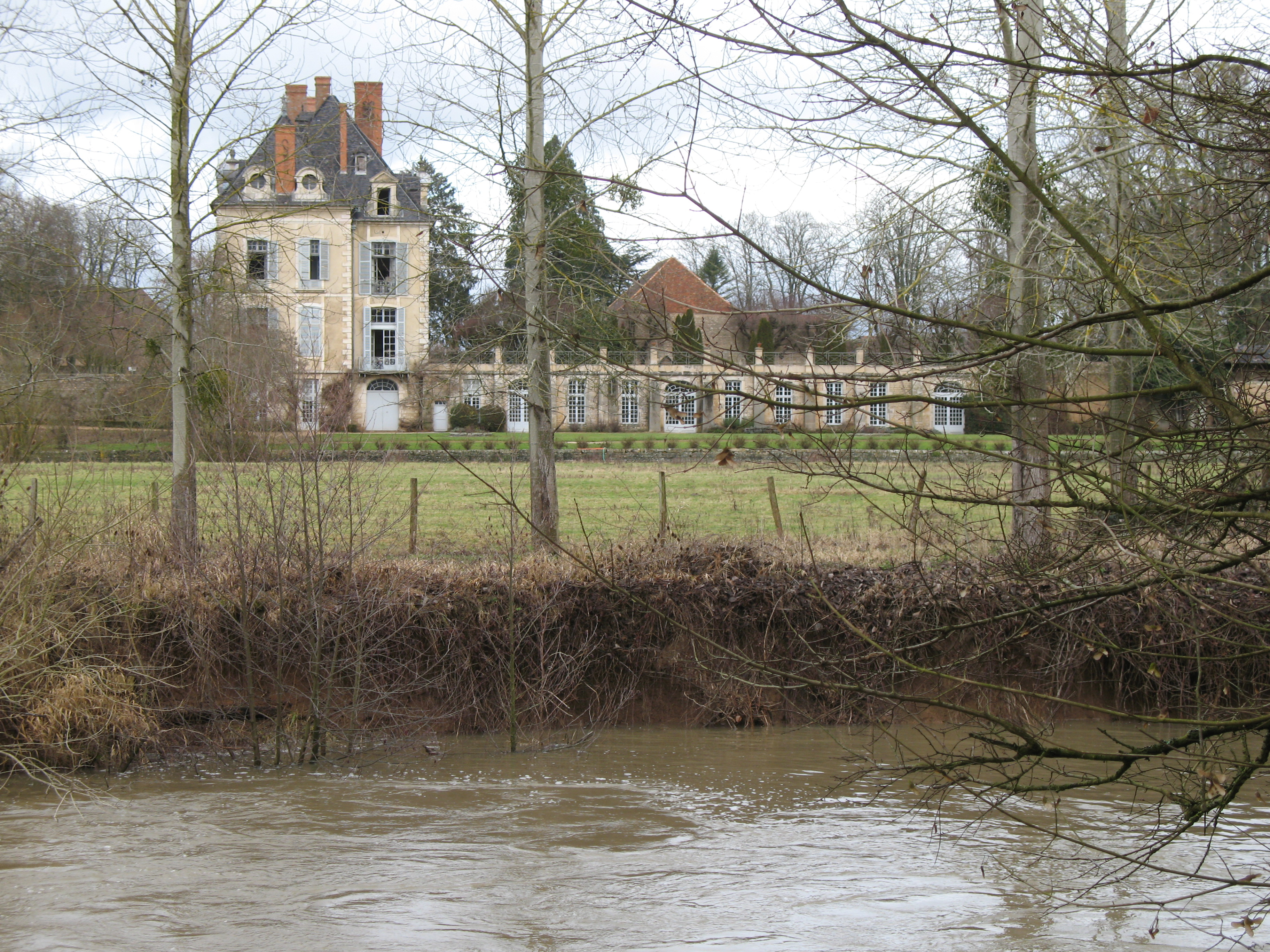 château de la Ferté - Saint-Ambreuil (Saône-et-Loire)